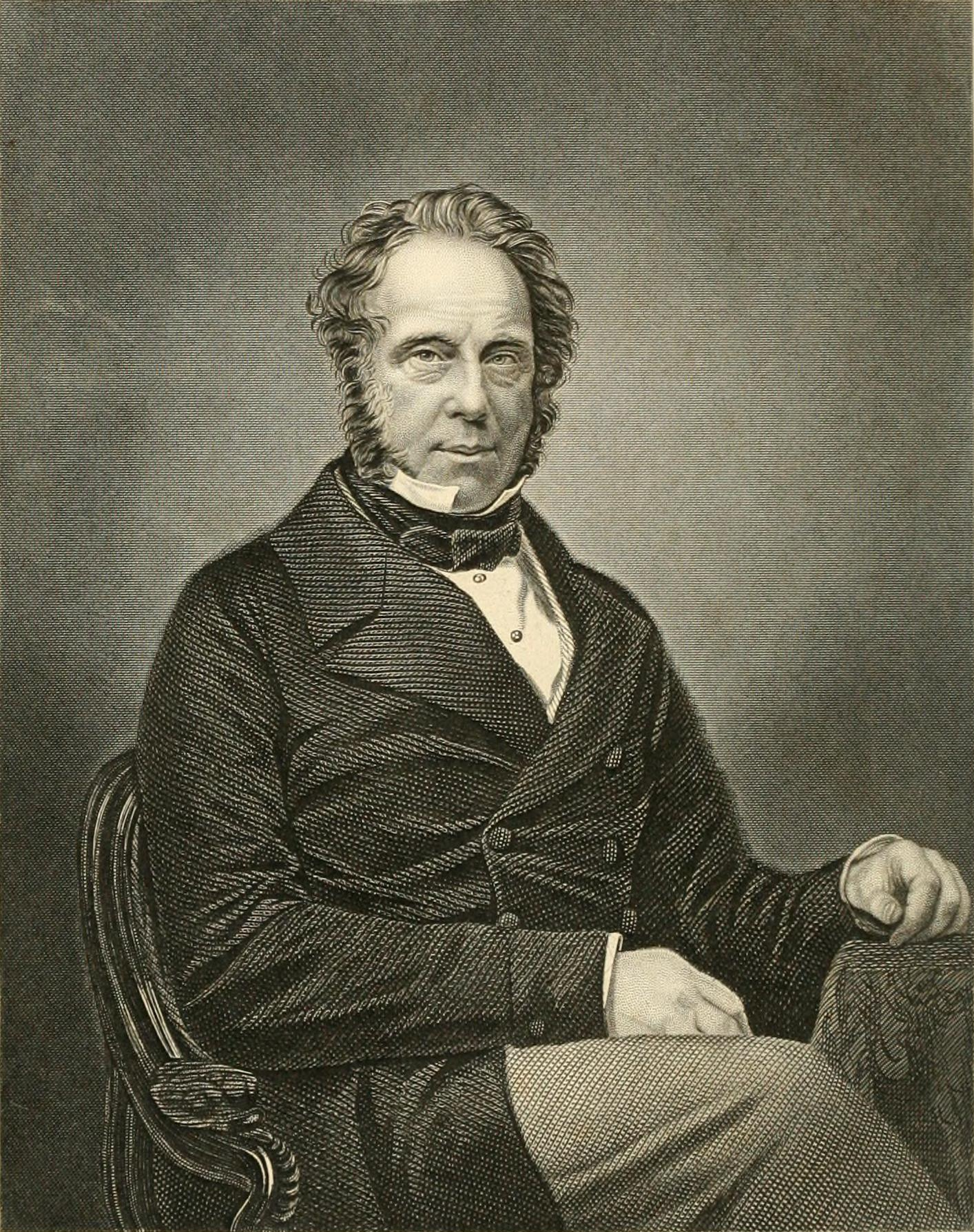 Lord Palmerston